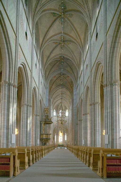 Motiv: Uppsala domkyrka Nyckelord: Riksintressen Kategori: (02) InteriörerUppsala domkyrka